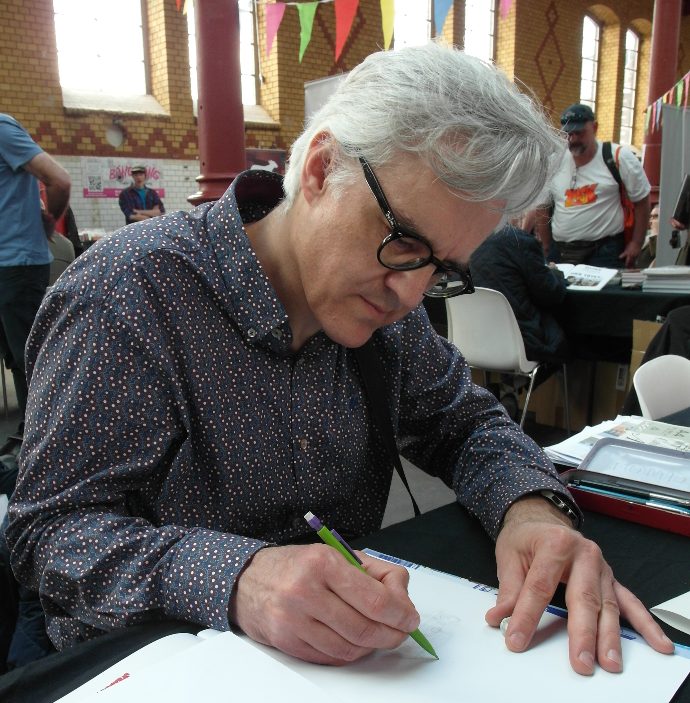 Jean-Luc Delvaux, belgischer Comiczeichner, beim Signieren auf der COMICIADE 2018 in Aachen